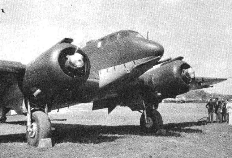 Aereo Savoia Marchetti SM.89